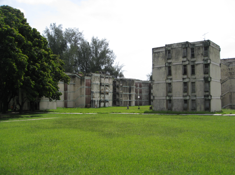 Edificios de la Beca en la UCLV.